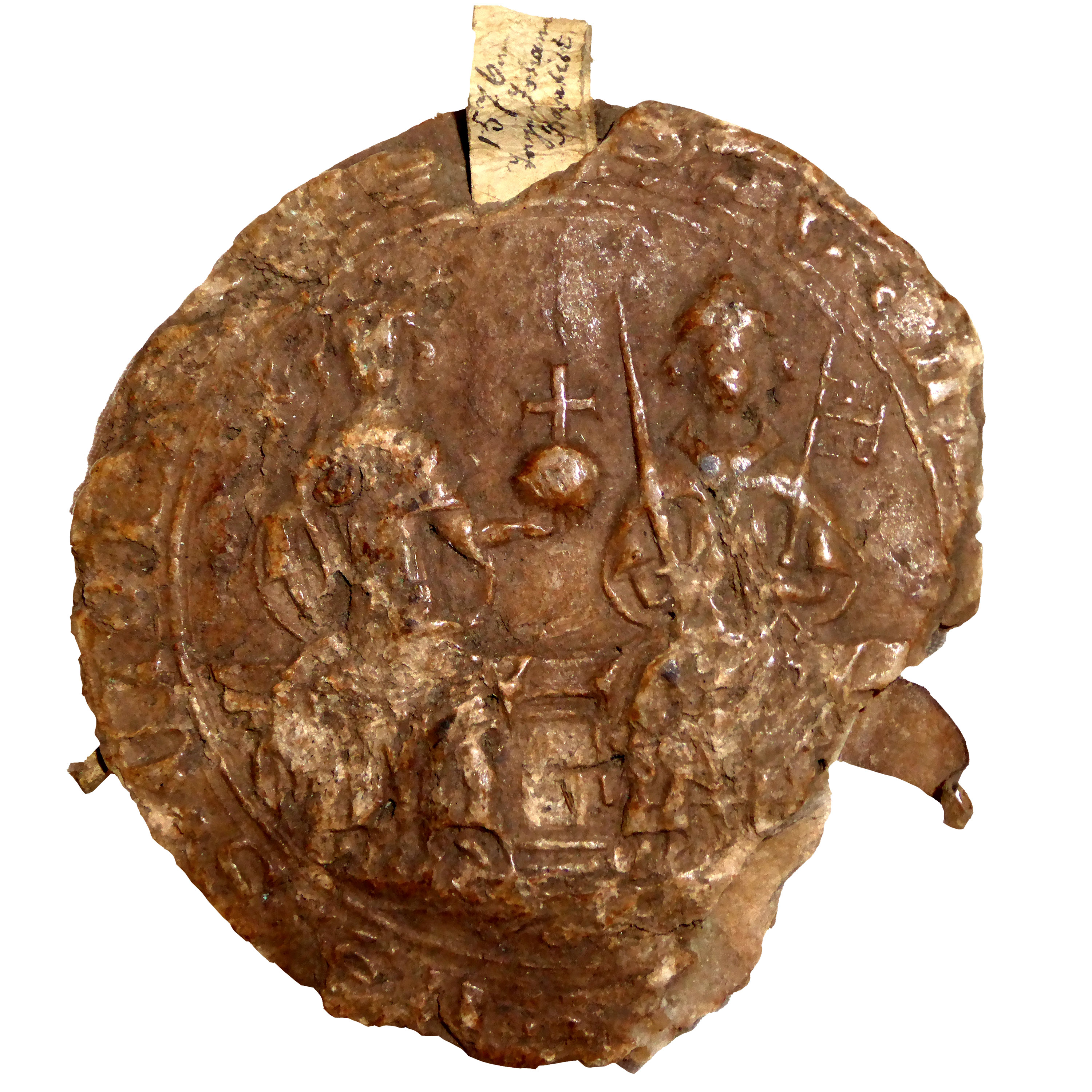 Siegel der Stadt Bremen 1366-1834, Bezeichnet: "SIGILLUM*BREMENSIS*CIVITATIS+", (auf dem Band: 1576 .... Johann Baptist) Wachs, Durchmesser 7,8 cm